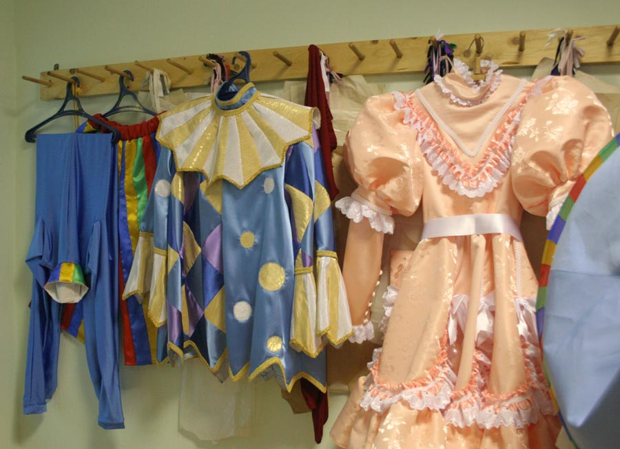 Пошивочный цех Саратовского театра кукол «Теремок»